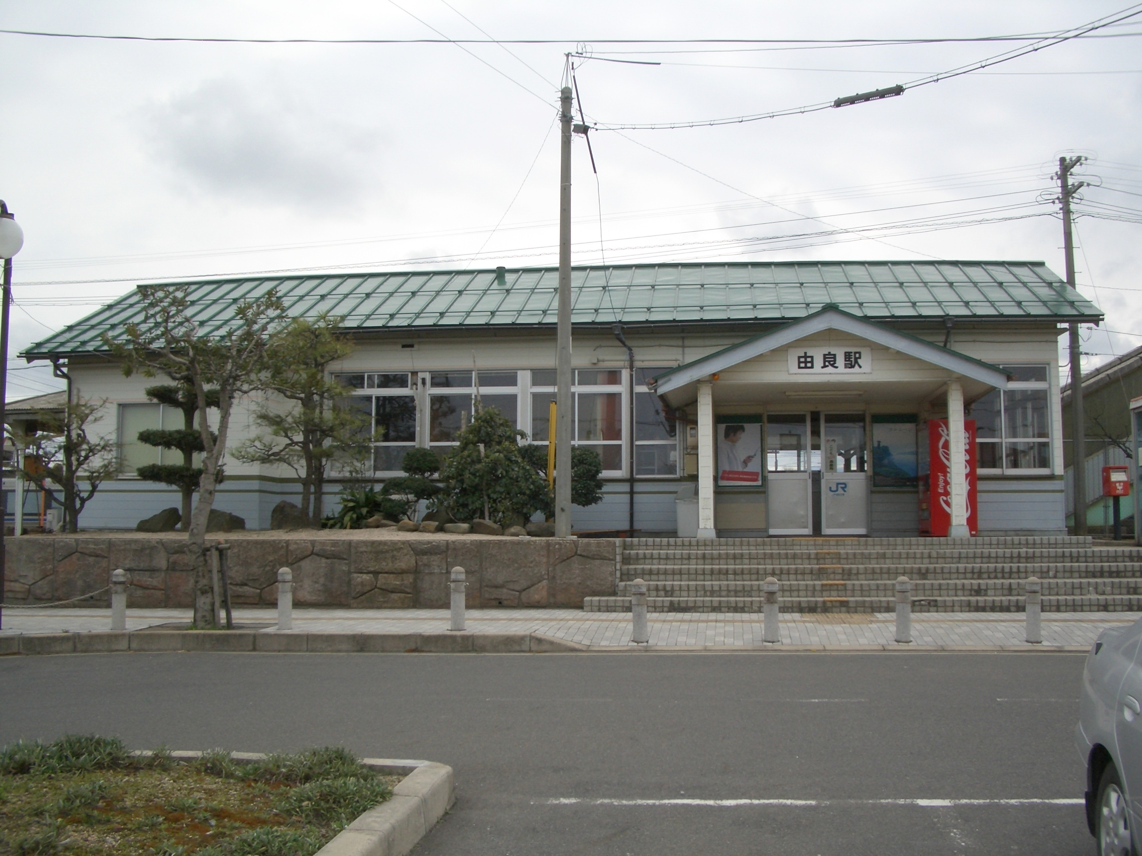 山陰本線由良駅